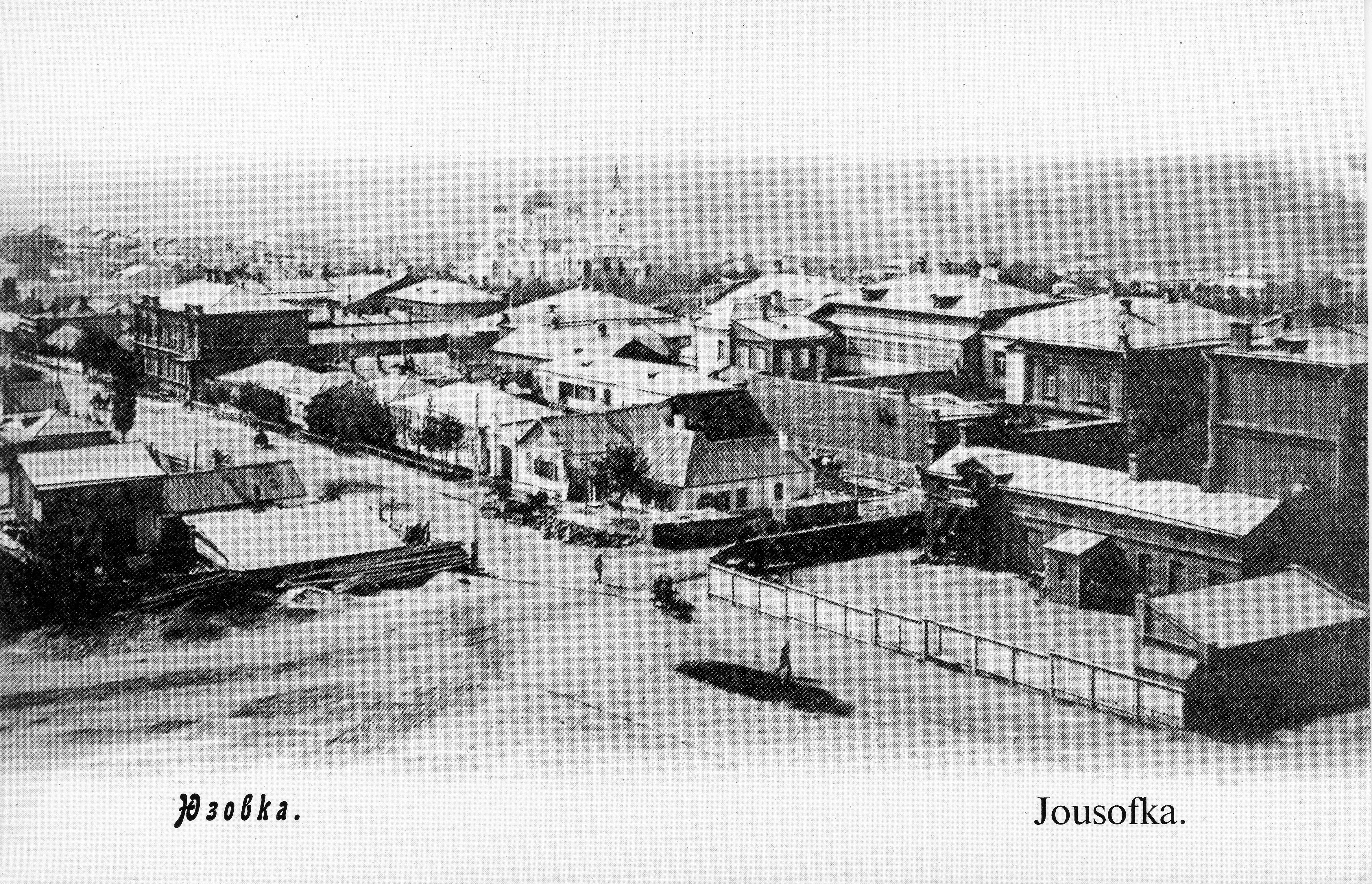 Дореволюционная открытка из Юзовки. Панорама центральной части Юзовки